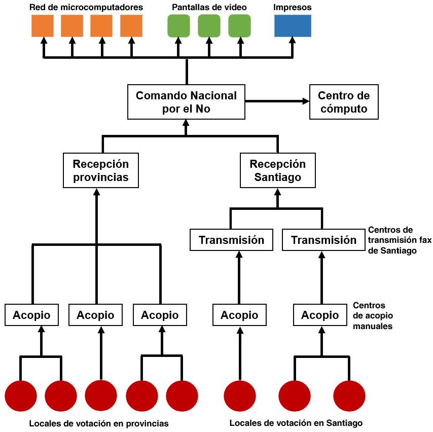 Diagrama del sistema de conteo paralelo realizado por el Comando del No en el plebiscito de Chile de 1988, basado en [1].